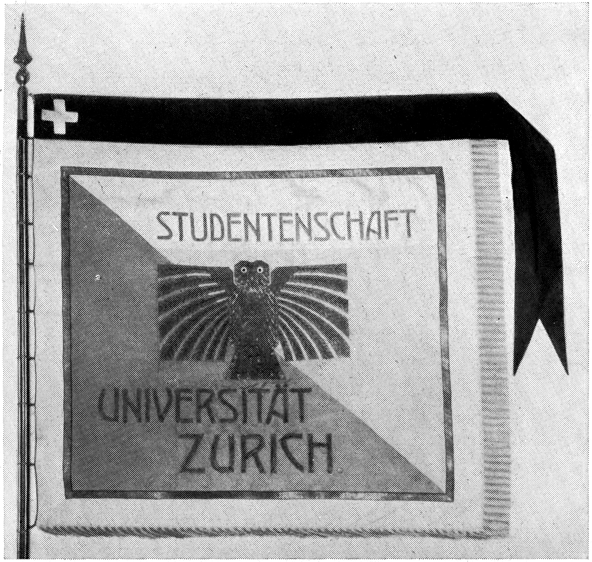 Fahne der Studentenschaft, seit 1919